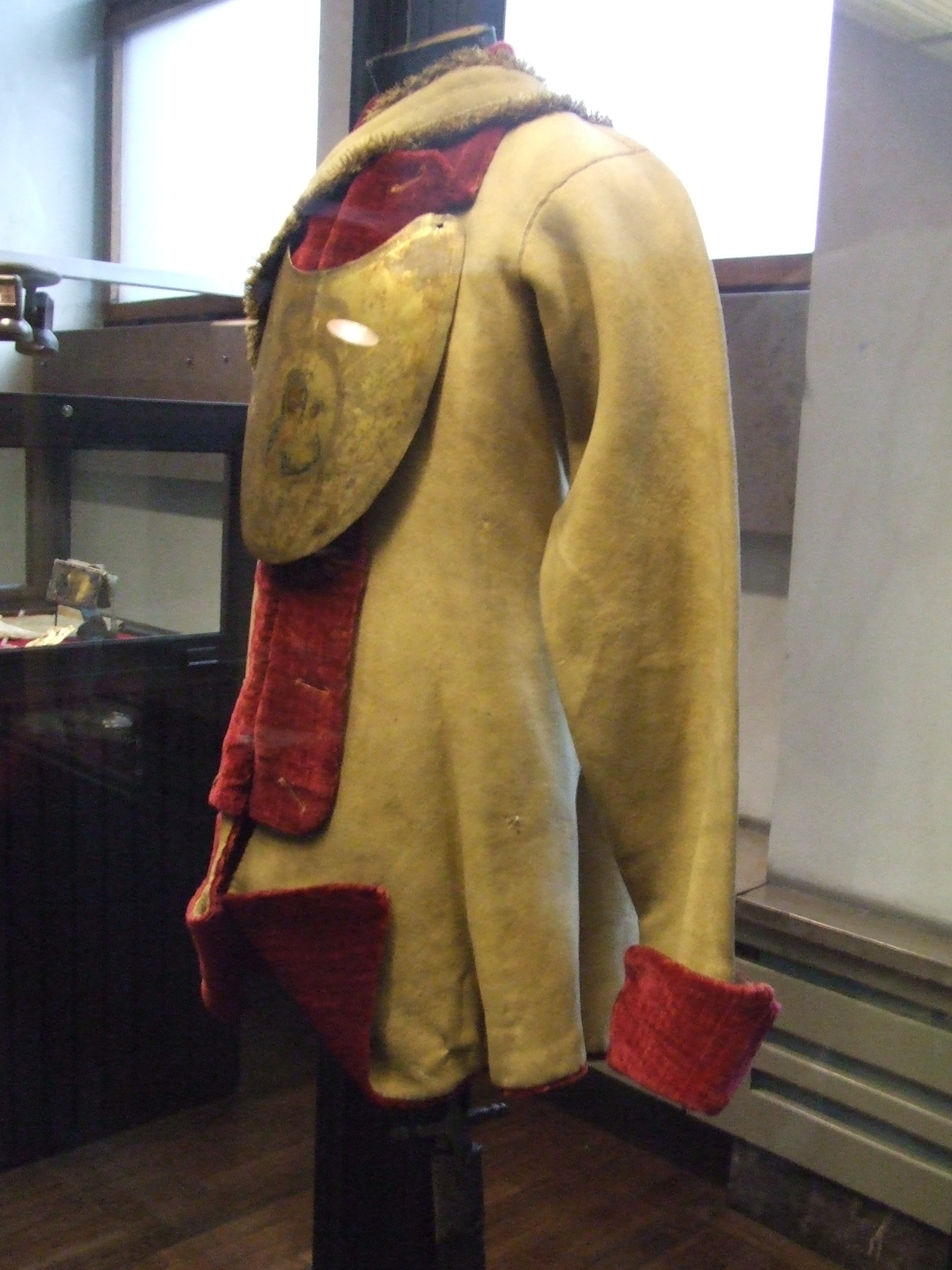 Kurtka Kawaleryjska Barska po Romuladzie Lisickim, eksponowana w Gmachu Głównym Muzeum Narodowego w Krakowie, depozyt Muzeum UJ, najstarszy obecnie zachowany mundur polski